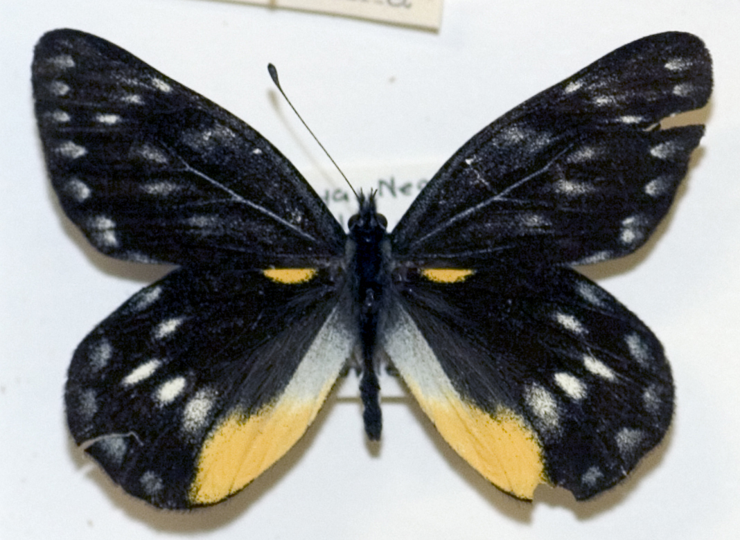 Delias belladonna malayana Pendlebury